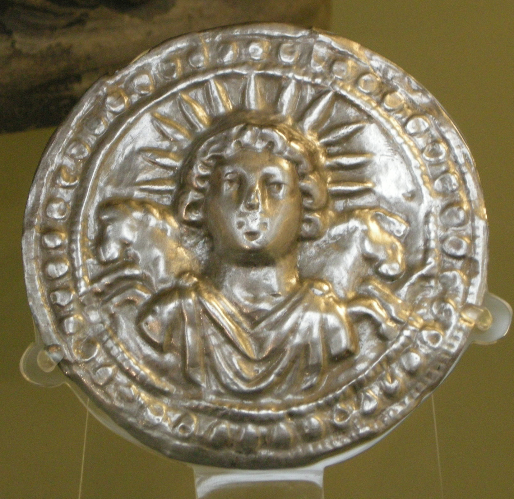 Arte romana, disco col sole invitto, 2 secolo